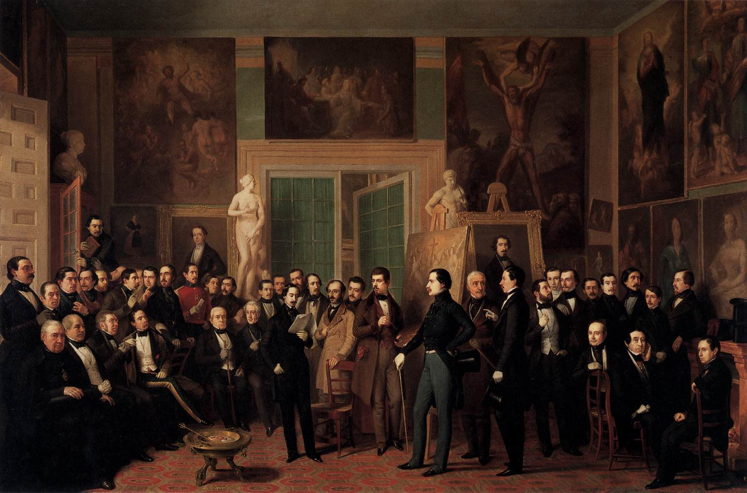 Esta obra es el cuadro más célebre del pintor sevillano Antonio María Esquivel (1806-1857), y una de las más destacadas del Romanticismo español. Y los personajes que aparecen retratados, además del propio pintor, son los siguientes: Antonio Ferrer del Río (1814-1872), Juan Eugenio Hartzenbusch (1806-1880), Juan Nicasio Gallego (1777-1853), Antonio Gil y Zárate (1793-1861), Tomás Rodríguez Rubí (1817-1890), Isidoro Gil y Baus (1814-1866), Cayetano Rosell y López (1817-1883), Antonio Flores (1818-1866), Manuel Bretón de los Herreros (1796-1873), Francisco González Elipe, Patricio de la Escosura (1807-1878), José María Queipo de Llano, conde de Toreno (1786-1843), Antonio Ros de Olano (1808-1887), Joaquín Francisco Pacheco (1808-1865), Mariano Roca de Togores (1812-1889), Juan González de la Pezuela (1809-1906), Ángel de Saavedra, duque de Rivas (1791-1865), Gabino Tejado (1819-1891), Javier de Burgos (1778-1848), José Amador de los Ríos (1818-1878), Francisco Martínez de la Rosa (1787-1862), Carlos Doncel, José Zorrilla (1817-1893), José Güell y Renté (1818-1884), José Fernández de la Vega, Ventura de la Vega (1807-1865), Luis de Olona (1823-1863), Julián Romea (1818-1863), Manuel José Quintana (1772-1857), José de Espronceda (1808-1842), José María Díaz (1813-1888), Ramón de Campoamor (1817-1901), Manuel Cañete (1822-1891), Pedro de Madrazo y Kuntz (1816-1898), Aureliano Fernández Guerra (1816-1891), Ramón de Mesonero Romanos (1803-1882), Cándido Nocedal (1821-1885), Gregorio Romero de Larrañaga (1814-1872), Bernardino Fernández de Velasco y Pimentel, duque de Frías (1873-1851), Eusebio Asquerino (1822-1892), Manuel Juan Diana (1814-1881) y Agustín Durán (1793-1862).